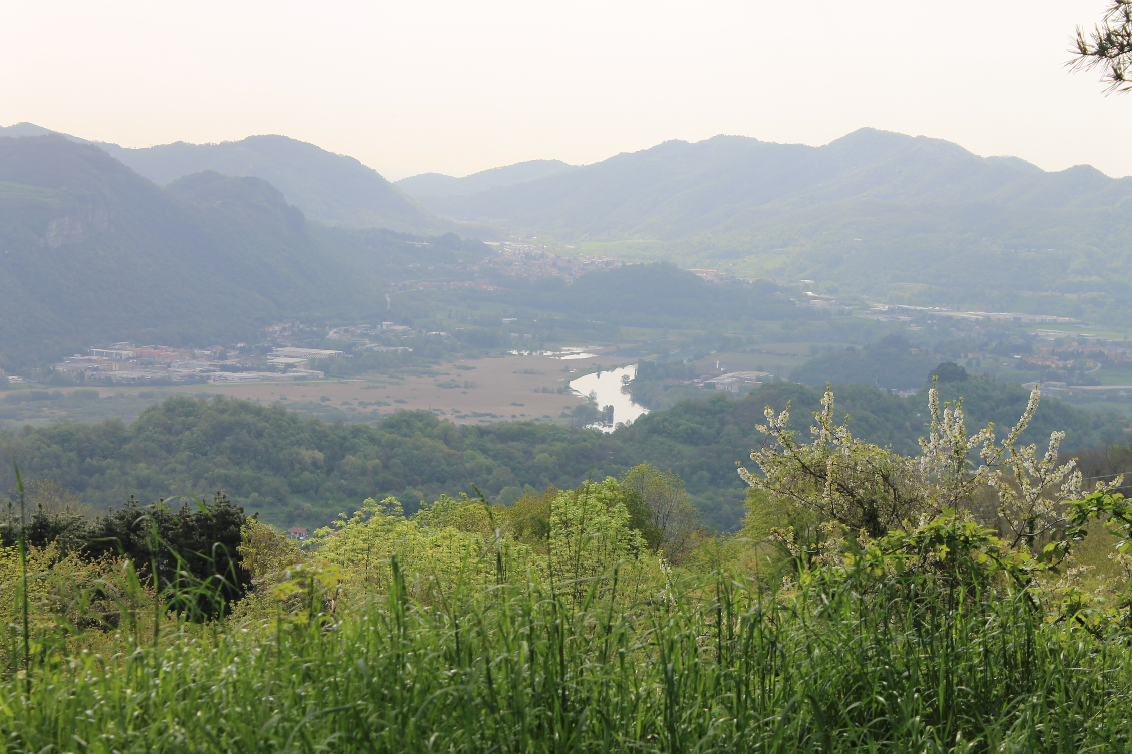 Paesaggio